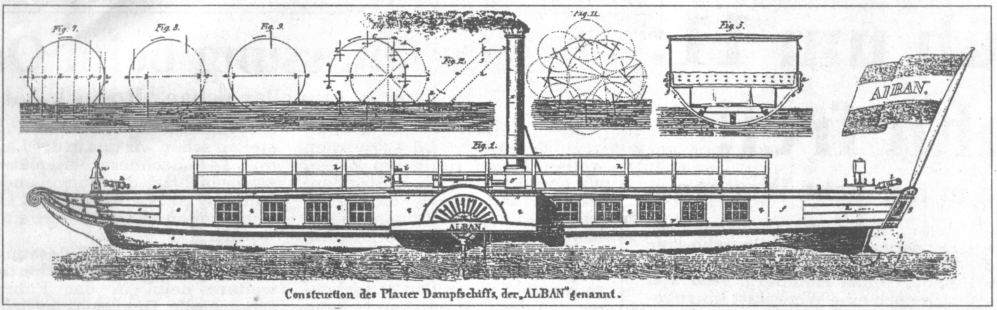 Konstruktionszeichnung Dampfer ALBAN